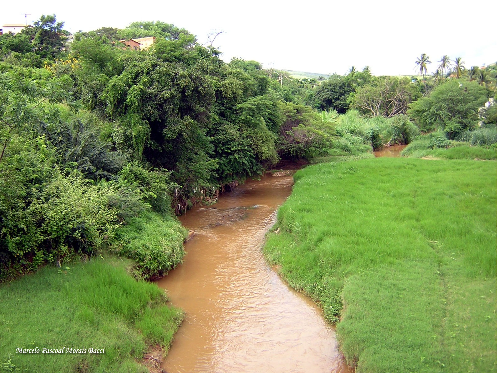 Descrição Rio Cabeceiras corta a cidade de Urandi Fonte Marcelo Pascoal Morais Bacci Licensing Licença